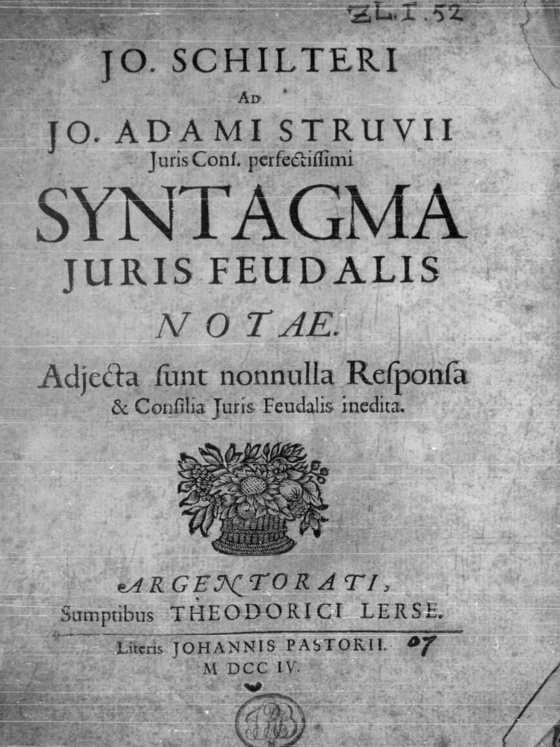 Frontespizio